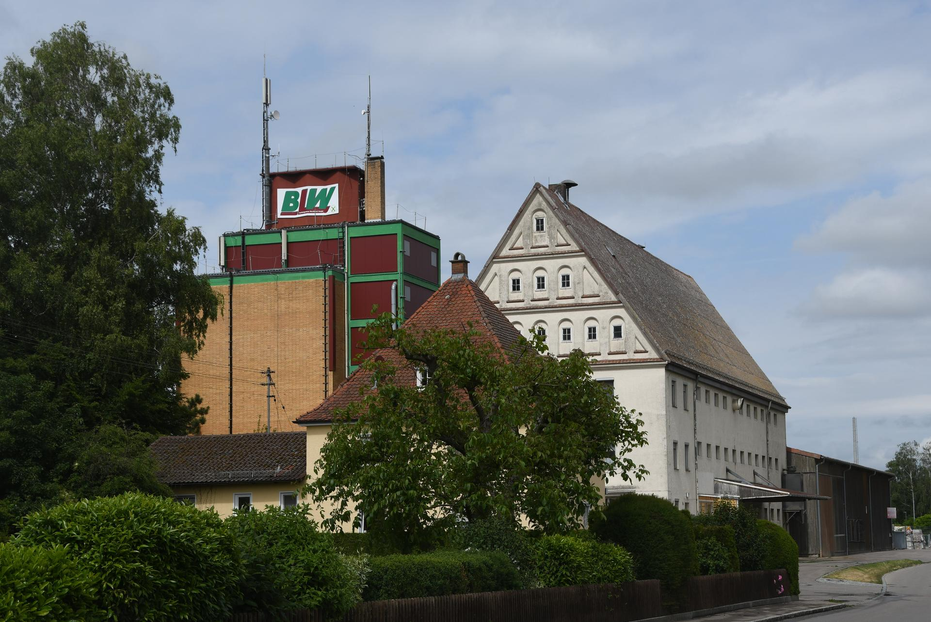 Bahnhof Wertingen, landirtschaftliches Lagerhaus